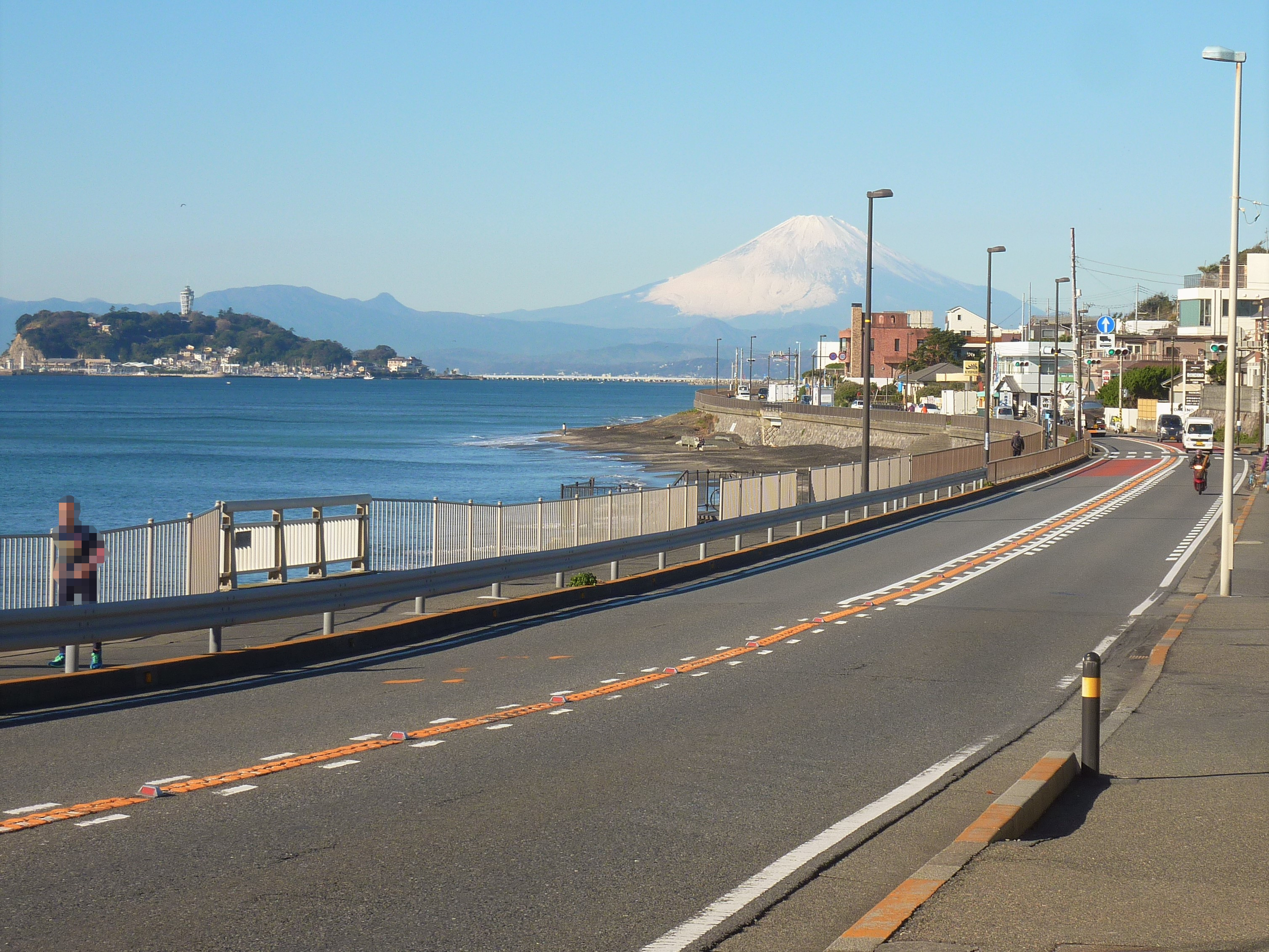 国道134号（鎌倉市・稲村ヶ崎付近）より富士山を望む